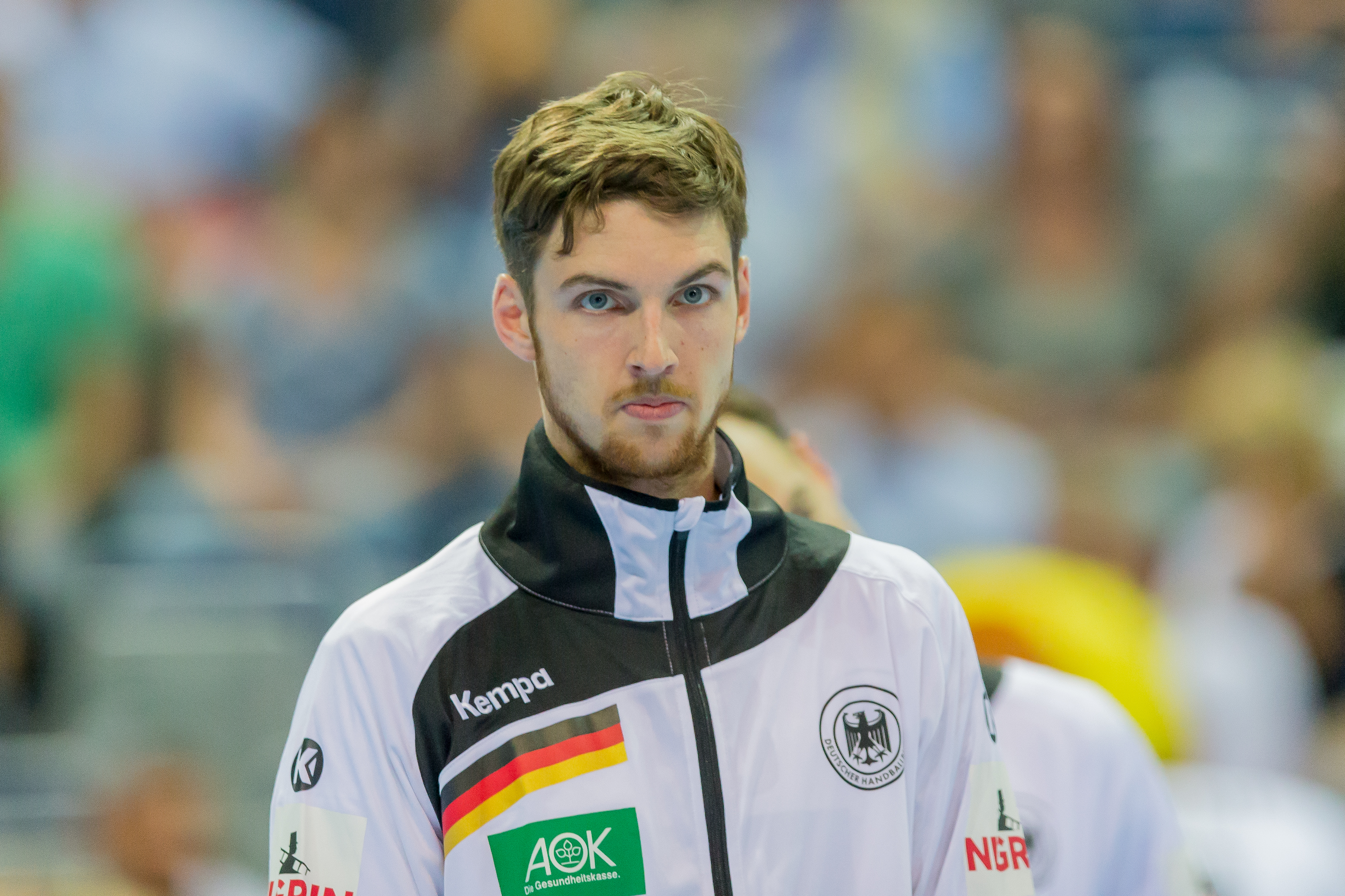 International Handball friendly match between Germany and Russia during Handball Deutschland vs Russland (25:27) at SAP Arena, Mannheim, Baden Württemberg, Germany on 2016-06-08, Photo: Sven Mandel